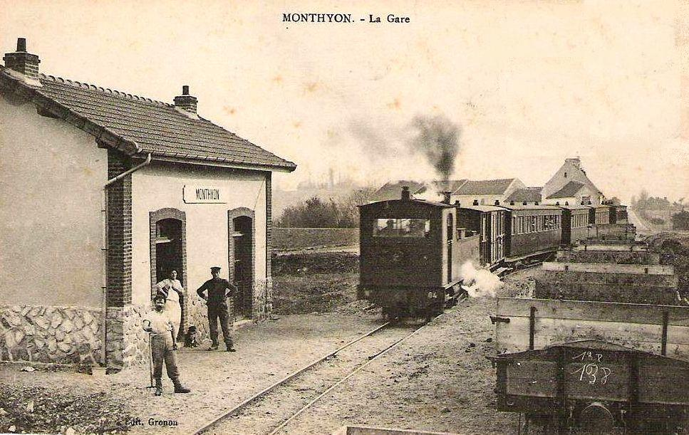 Train du tramway de Meaux à Dammartin pendant le premier temps de l'exploitation en 1912/13, locomotive n° 04. En effet, le bâtiment-voyageurs a été doté d'un étage avant la Première Guerre mondiale.